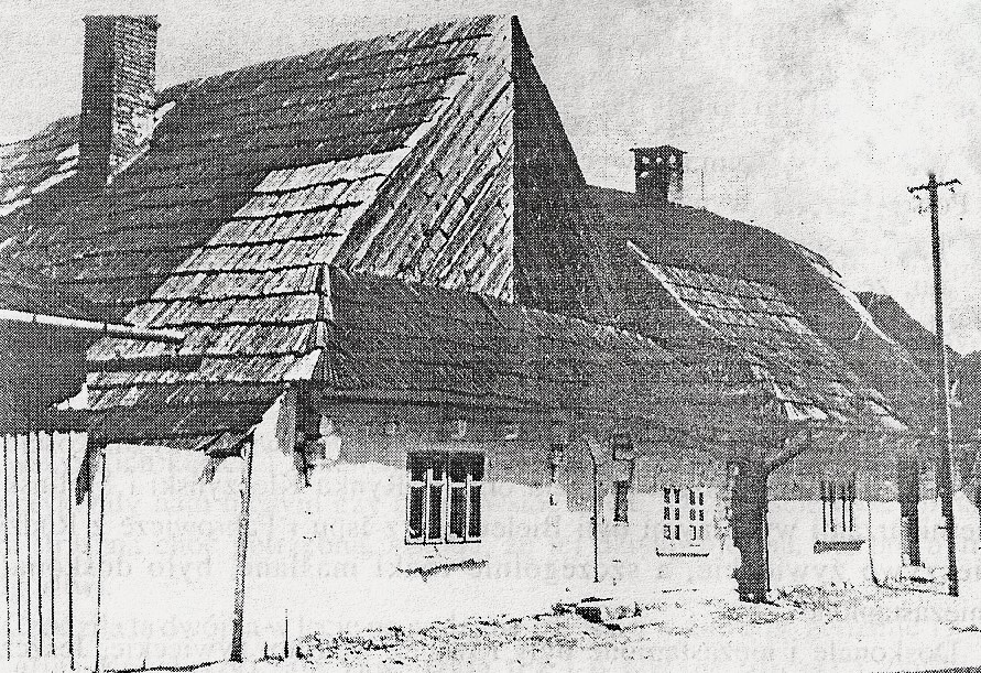 ul. Bracka w Żywcu, I poł. XX w.